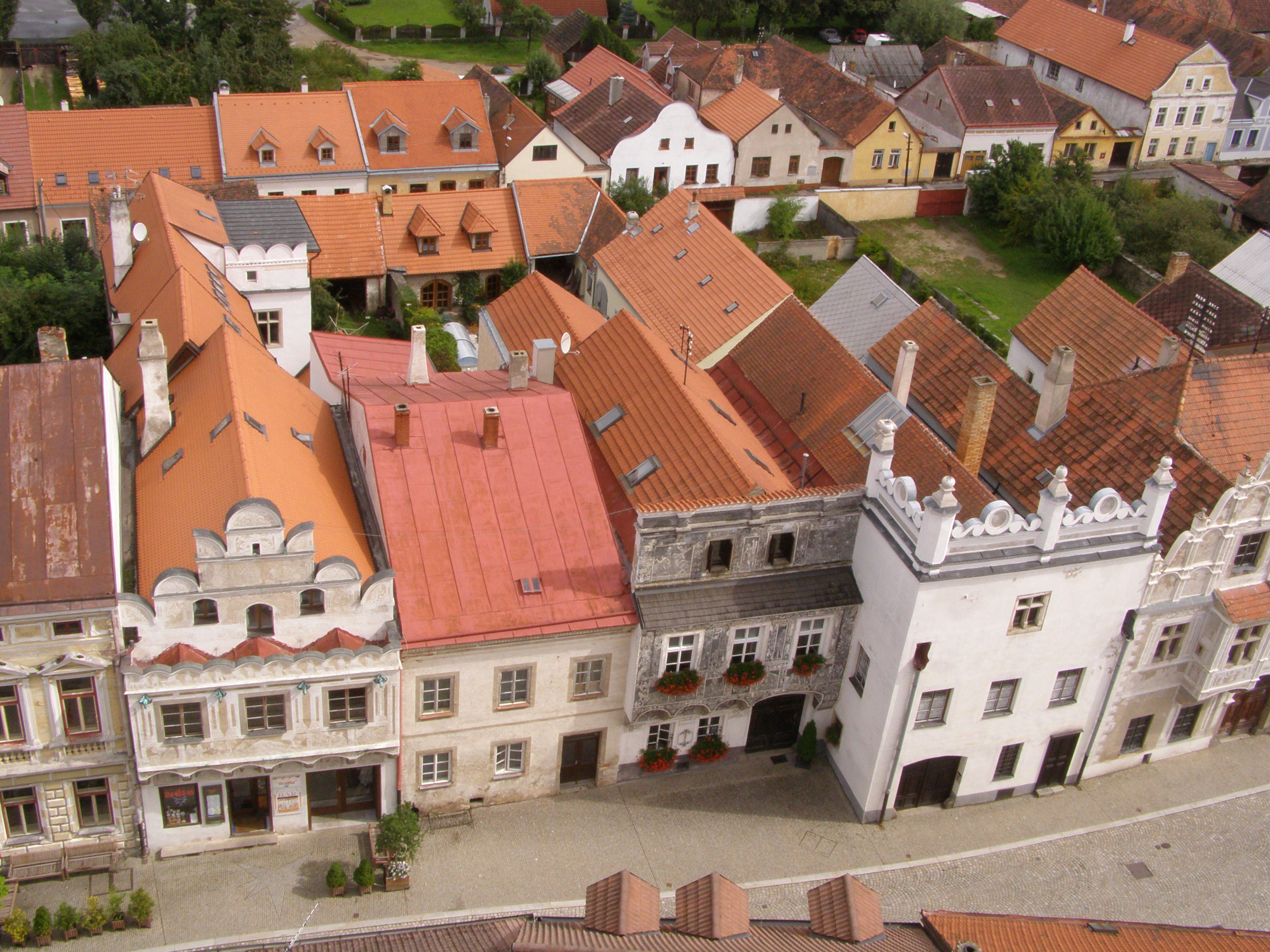 Slavonice, pohled z věže kostela Nenebevzetí Panny Marie, v popředí Horní náměstí, v pozadí ulice Jana Švermy